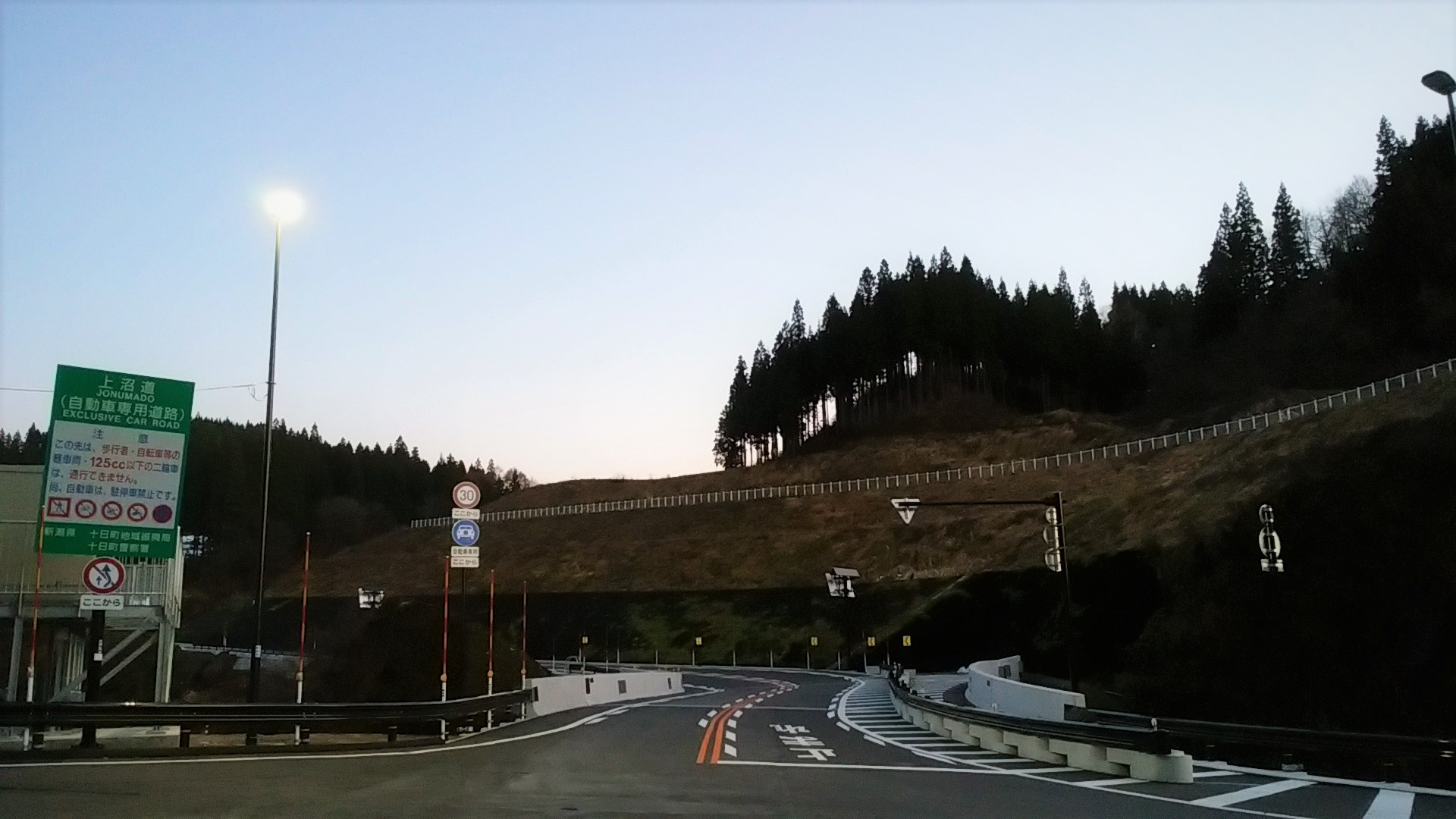 八箇インターチェンジのほぼ全景